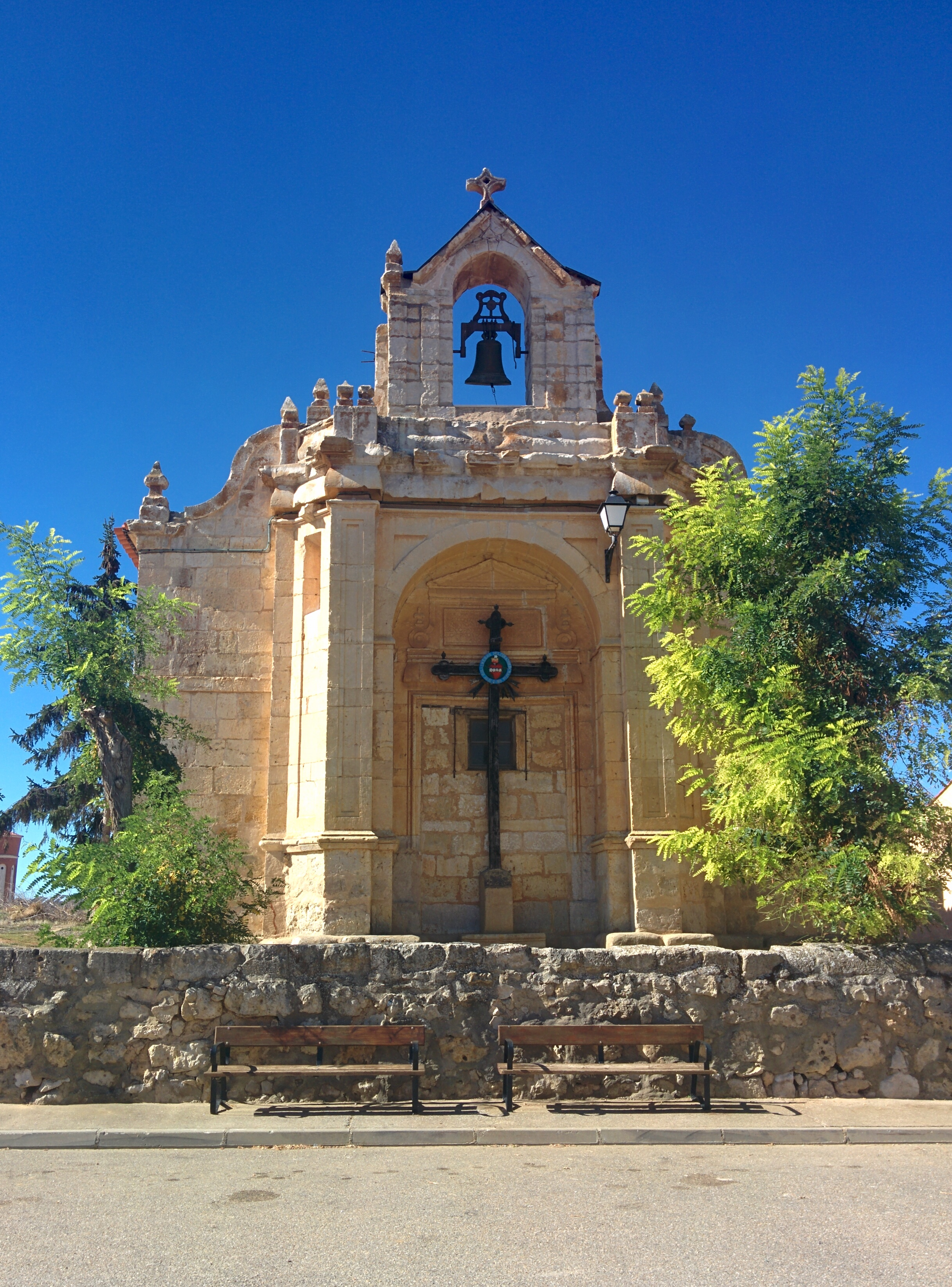 Iglesia de San Cucufate, en Villardefrades (Valladolid, España).